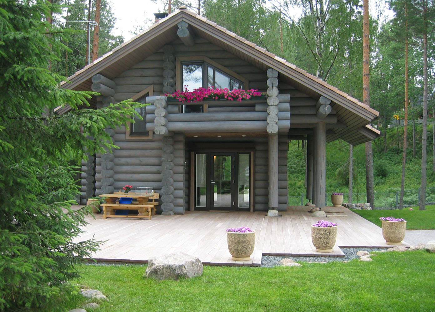 низкая терраса